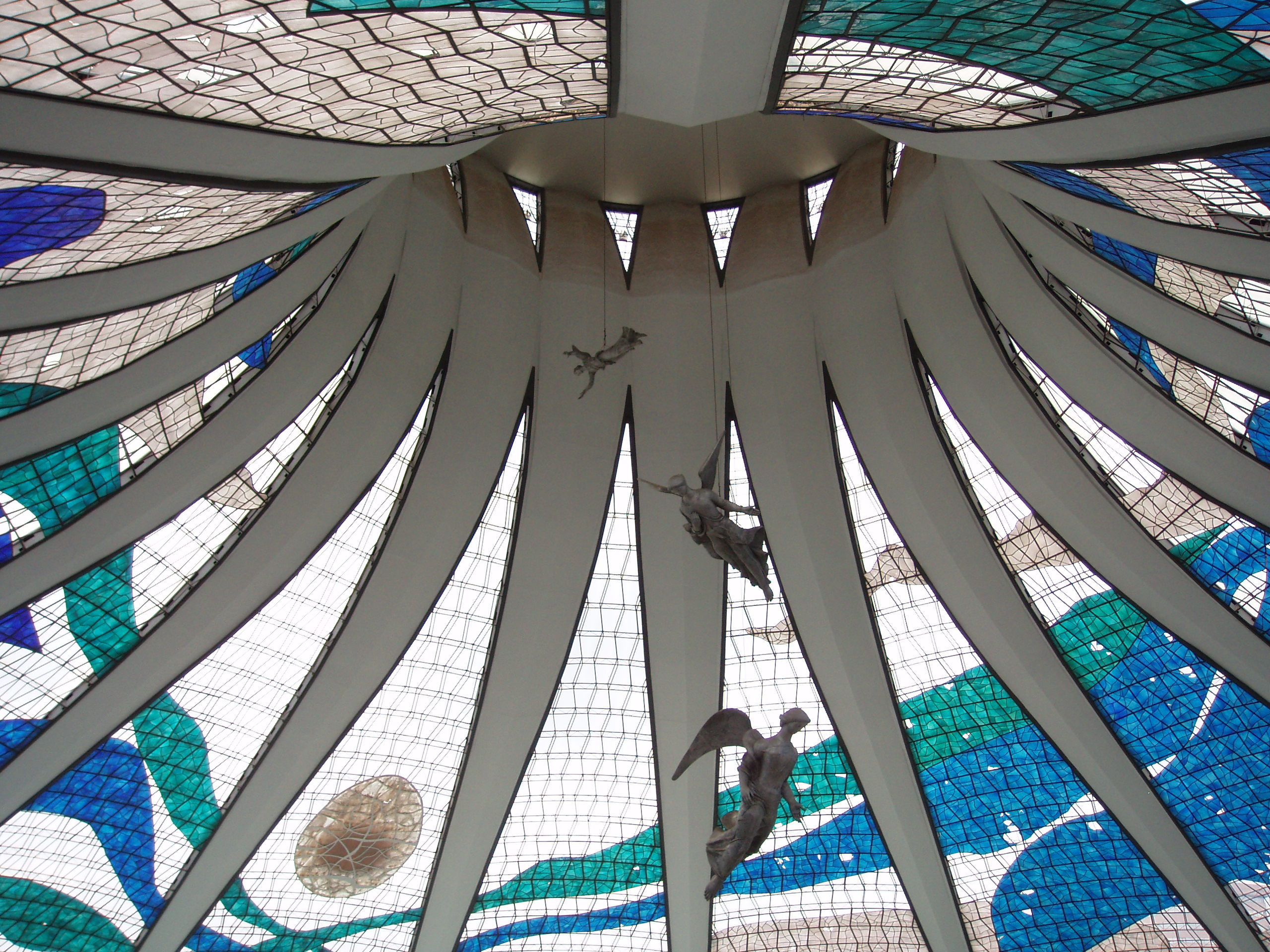 Interior de la Catedral de Brasilia en Brasil